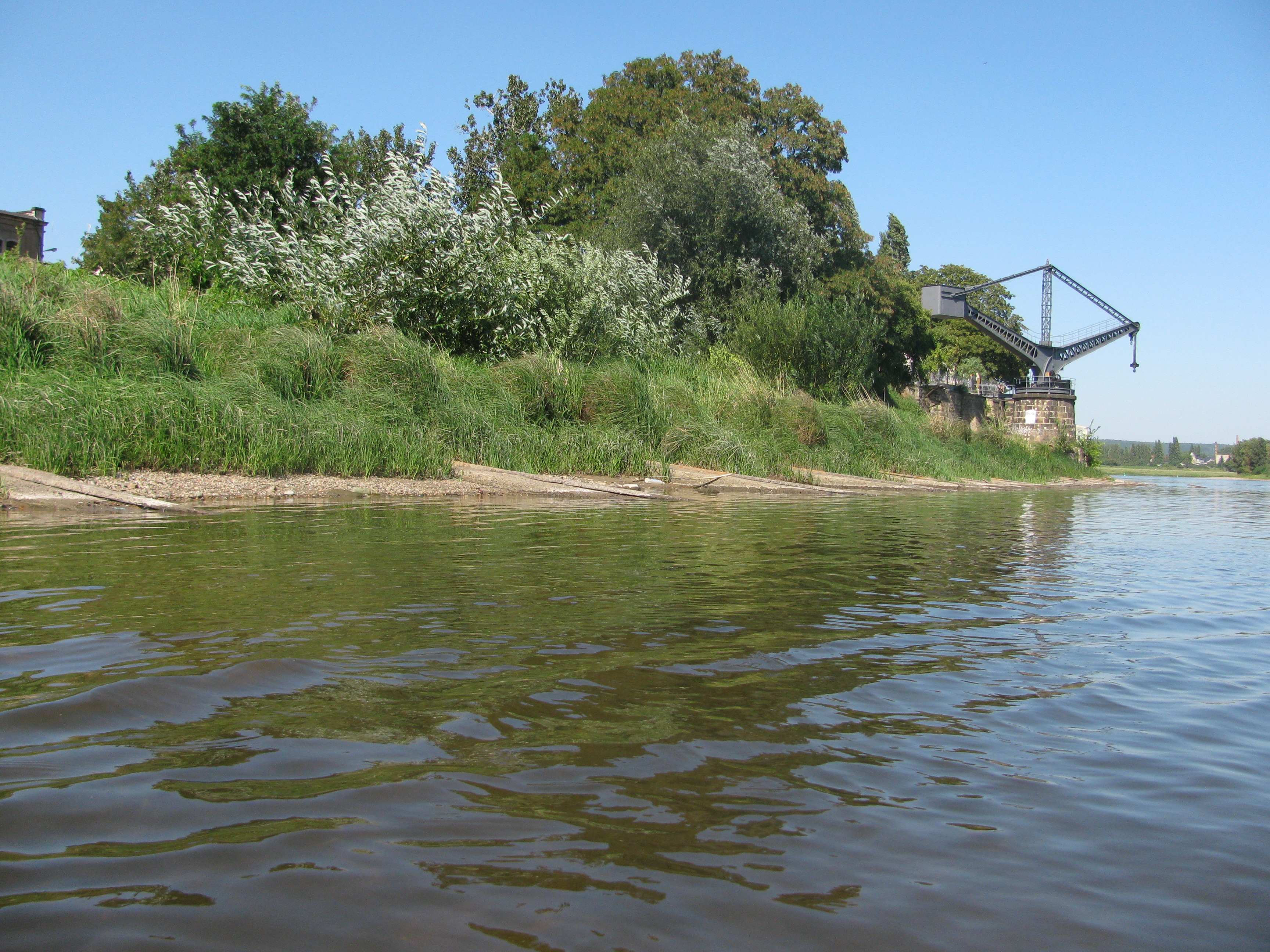 Reste der Slipanlage der Schiffswerft Übigau, Dresden